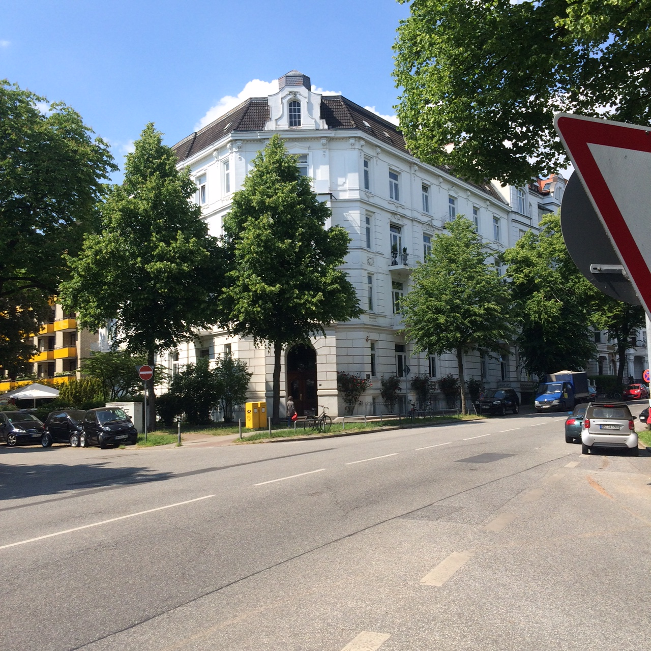 Haus Heilwigstraße 33/Ecke Isestraße, Hamburg